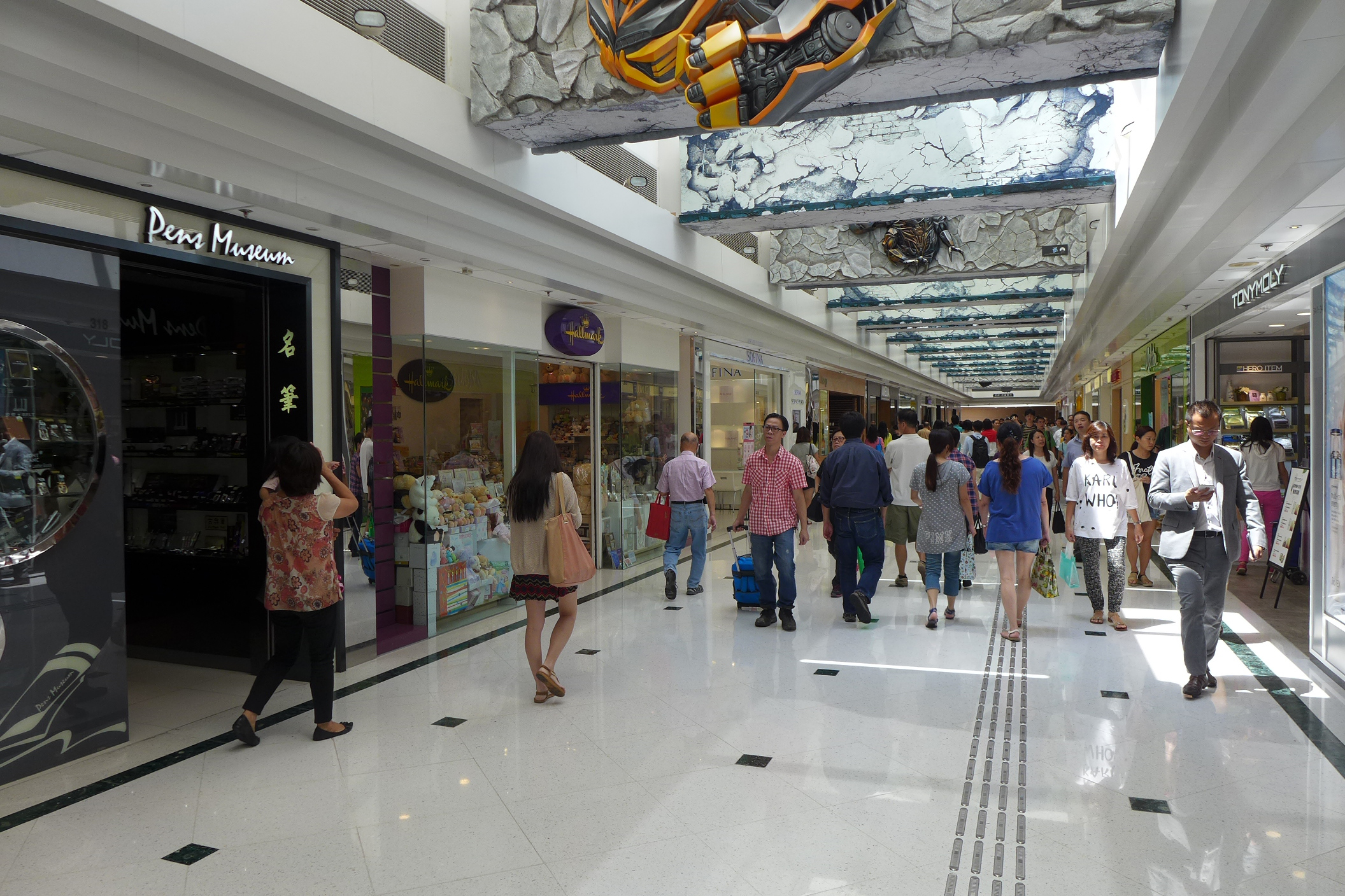 Telford Plaza Phase 2 Corridor